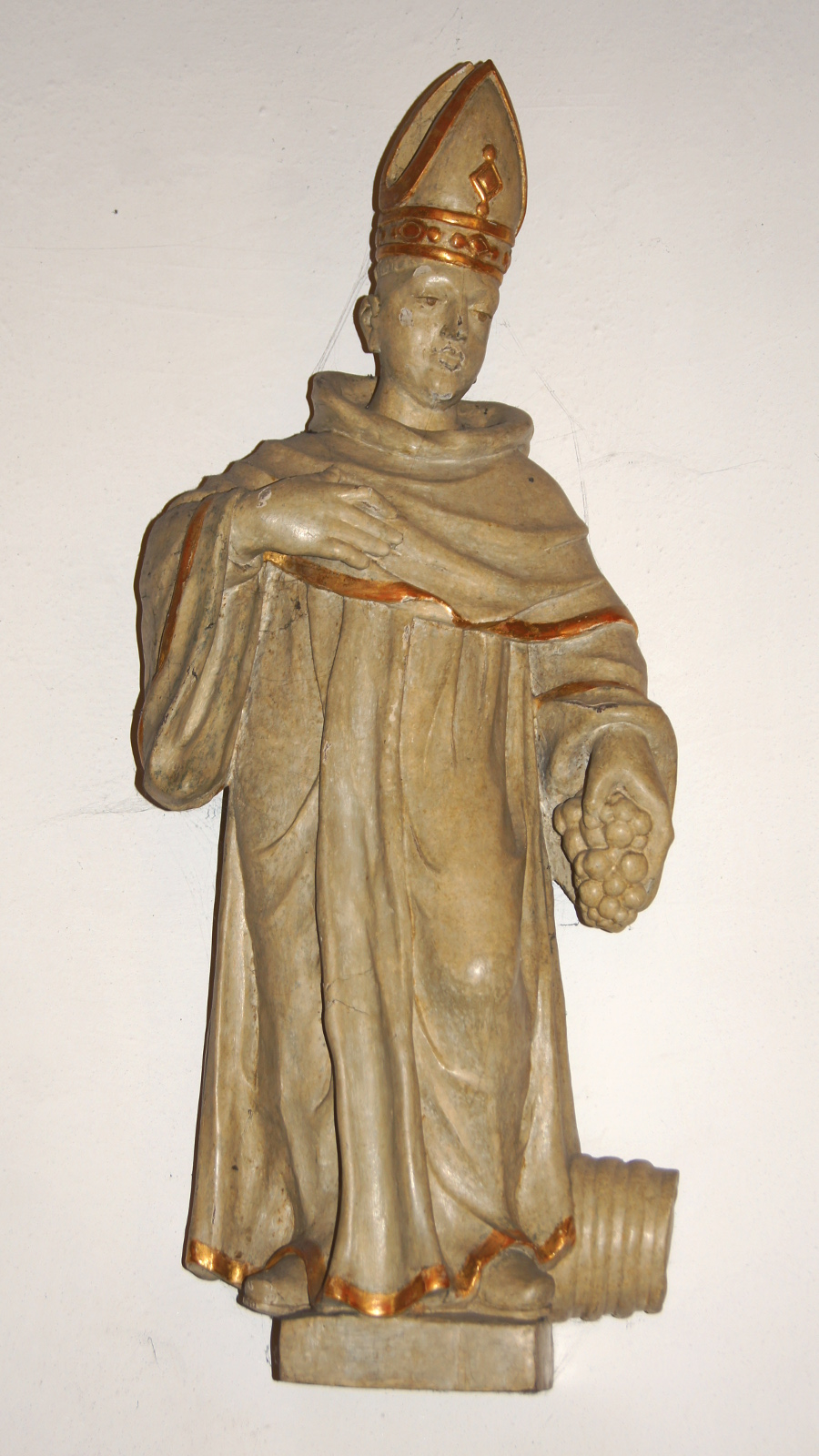 Hölzerne Statue des Hl. Wigbert, Abt in Fritzlar, mit Mitra, Weinfass und Traube in der Klosterkirche St. Marien Burlo, Stadt Borken (NRW). Die Entstehung der Figur wird auf das Ende des 17. / Anfang des 18. Jahrhunderts datiert. This is a photograph of an architectural monument. A1 - A 26